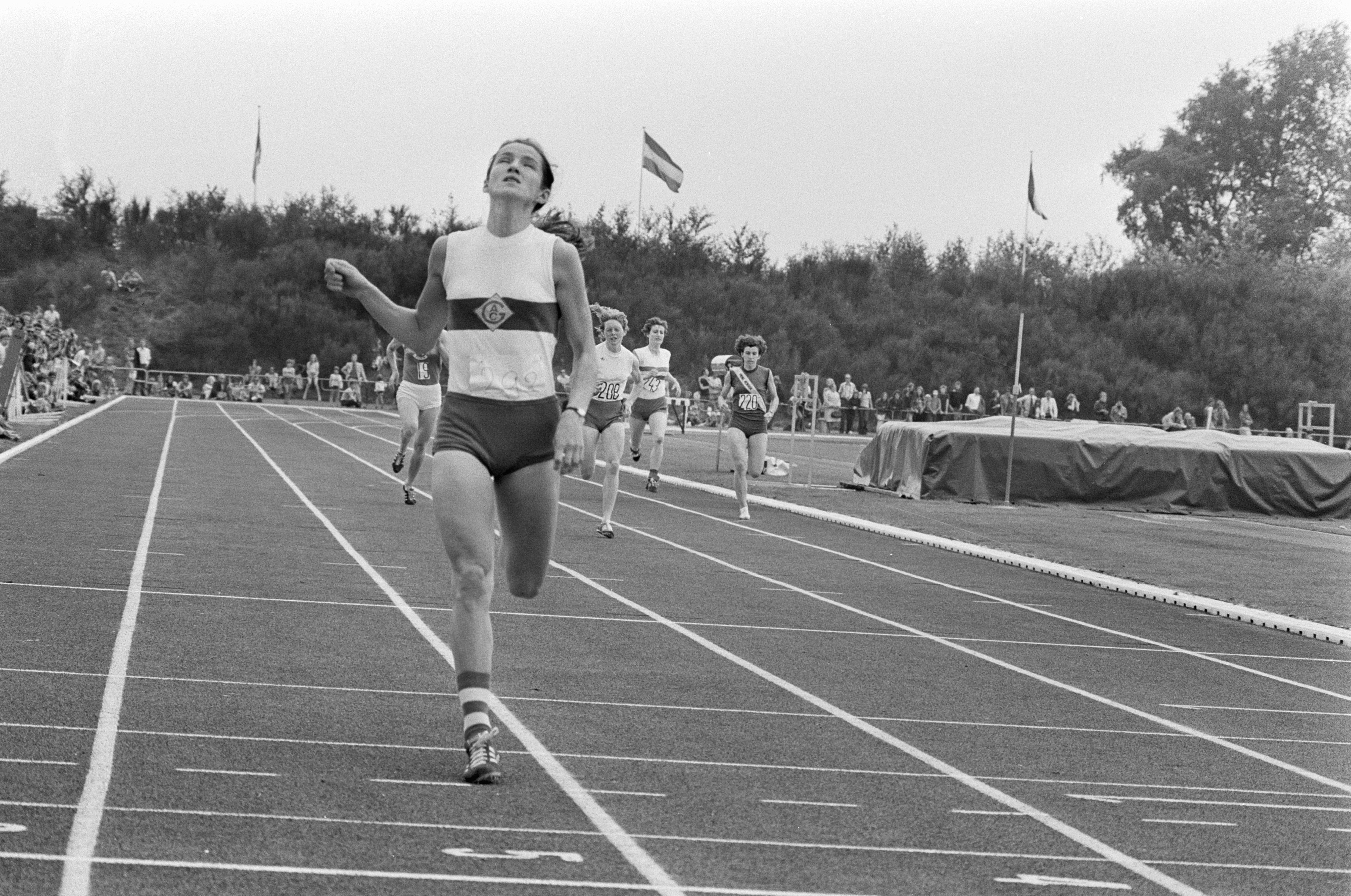 Collectie / Archief : Fotocollectie Anefo Reportage / Serie : [ onbekend ] Beschrijving : Nederlandse atletiekkampioenschappen 1974 op Papendal; Trudy Wunderink Ruth wint de 400 meter Datum : 3 augustus 1974 Trefwoorden : atletiek, kampioenschappen Instellingsnaam : Papendal Fotograaf : Verhoeff, Bert / Anefo Auteursrechthebbende : Nationaal Archief Materiaalsoort : Negatief (zwart/wit) Nummer archiefinventaris : bekijk toegang 2.24.01.05 Bestanddeelnummer : 927-3672